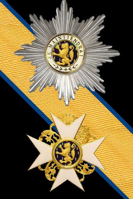 Scan van een kruis uit mijn collectie. Het lint is getekend.